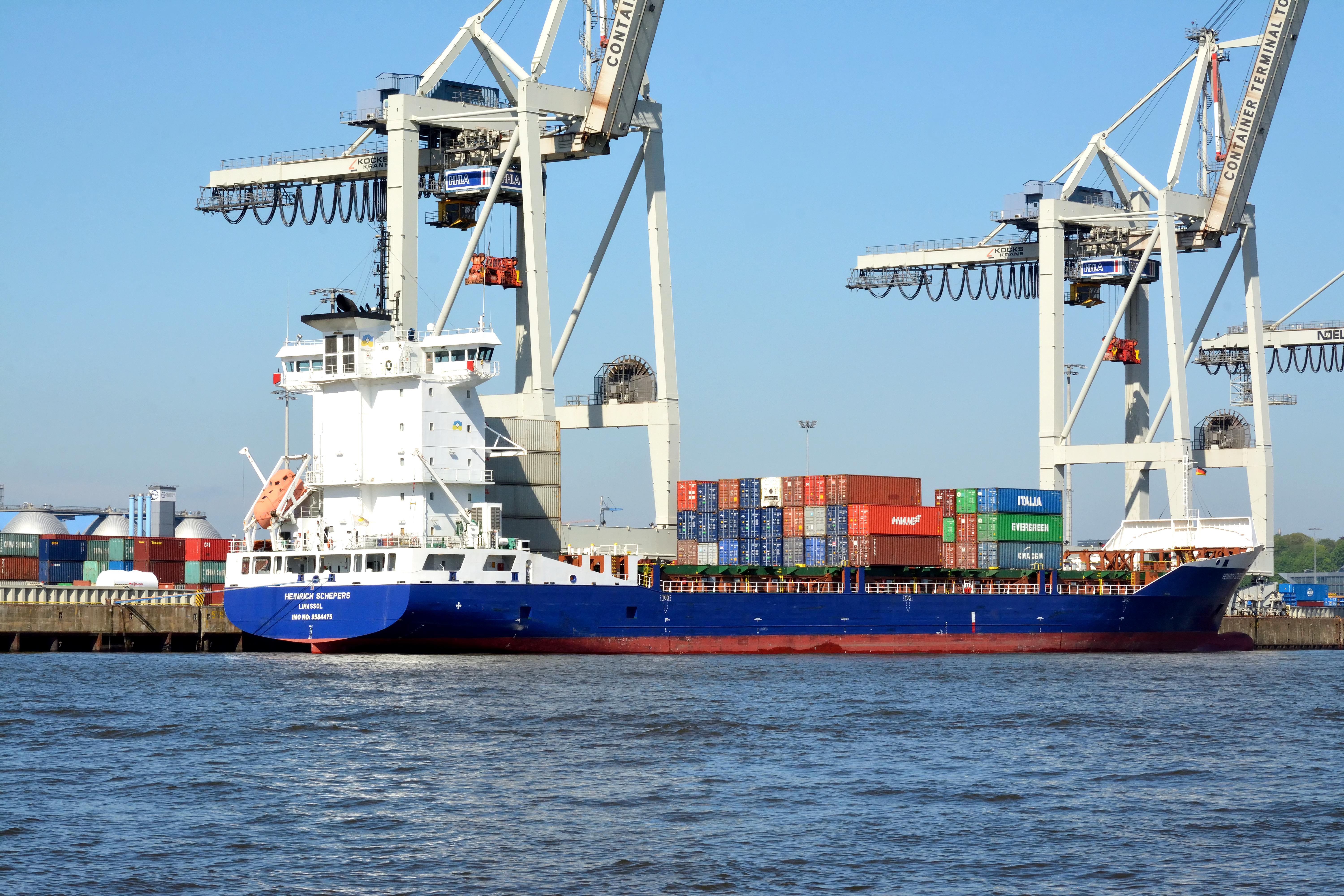 Impressionen eines Wochenendes in Hamburg mit dem Titel: Wikipedia:AhoiFotos der Barkassenfahrt am Samstag im Hamburger Hafen.Feederschiff Heinrich Schepers im Hamburger Hafen am Containerterminal "Tollerort"